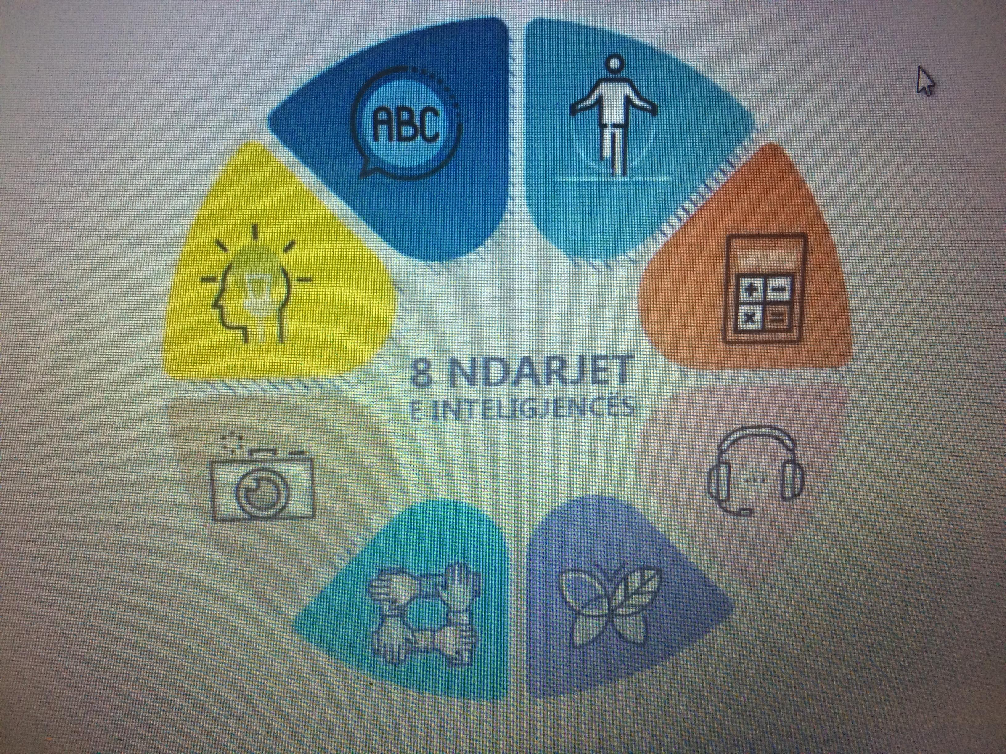 8 llojet e inteligjencave te shumefishta